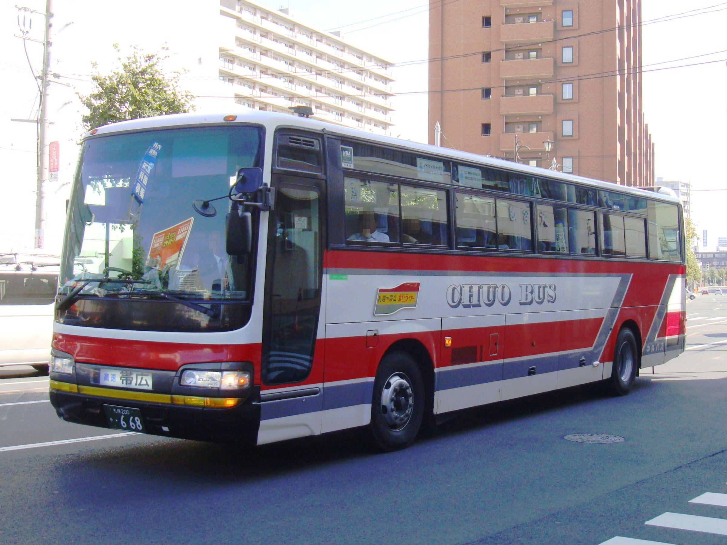 "Potato Liner" Sapporo to Obihiro